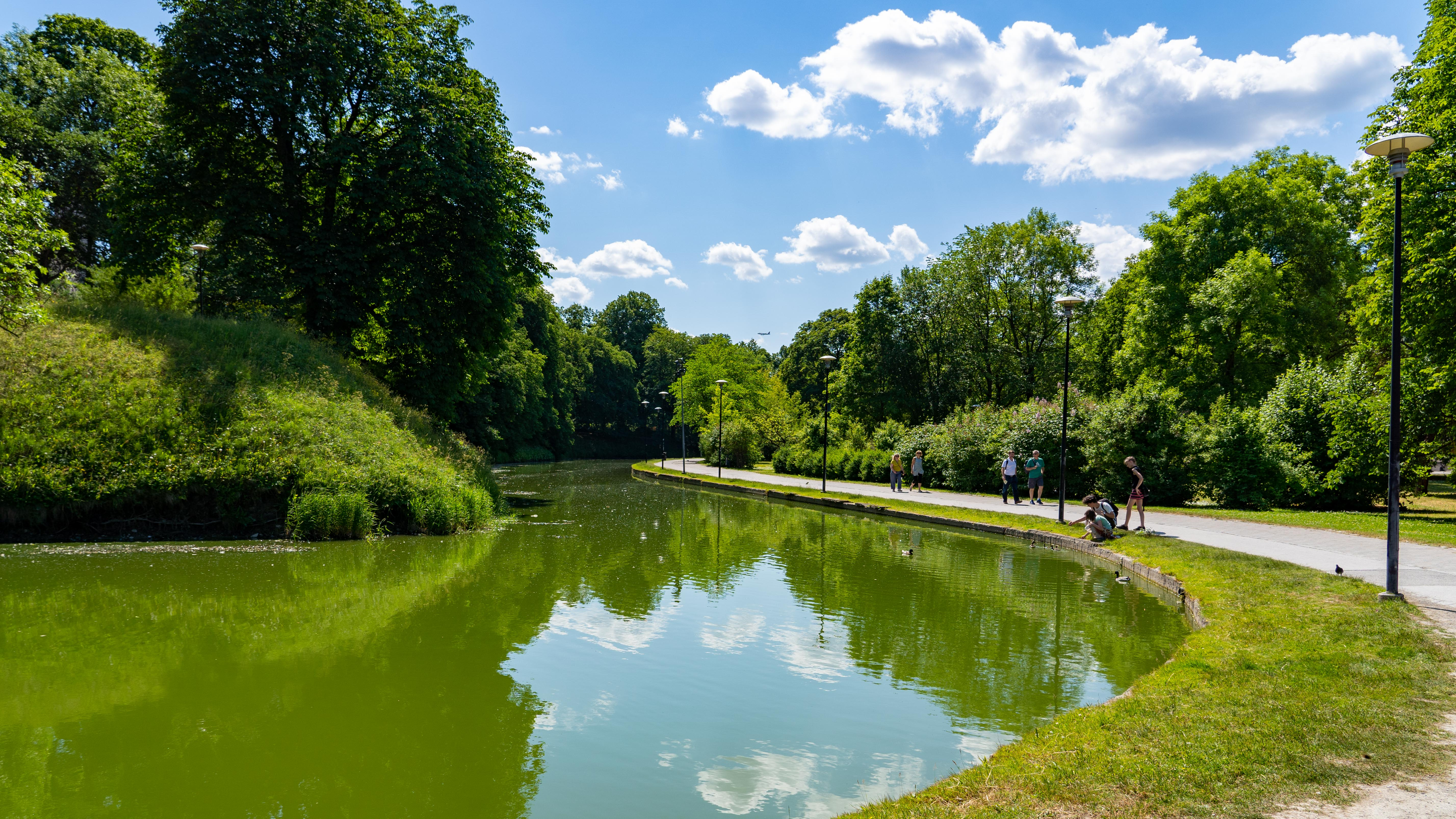 Vaade Snelli tiigile, 17.06.2018.